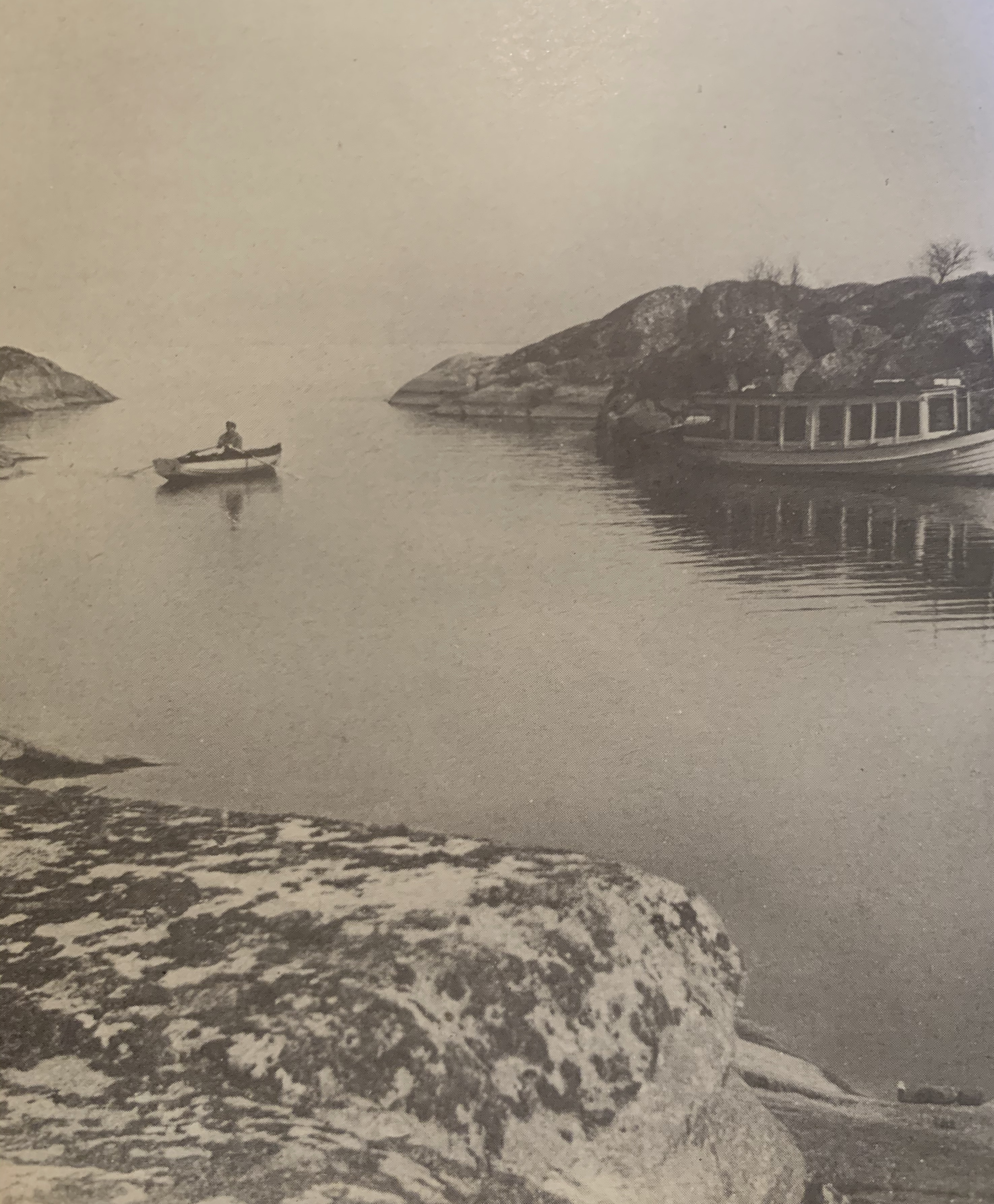 Vid Kallskär togs 3,000 liter sprit och 20 flaskor fin whisky i beslag 1929